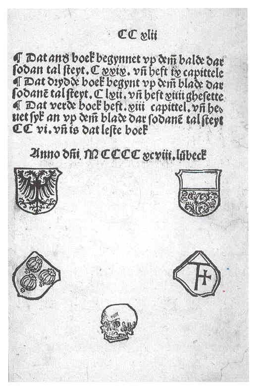 Reynke de vos Excipit der Lübecker Inkunabel von 1498 mit Druckermarken